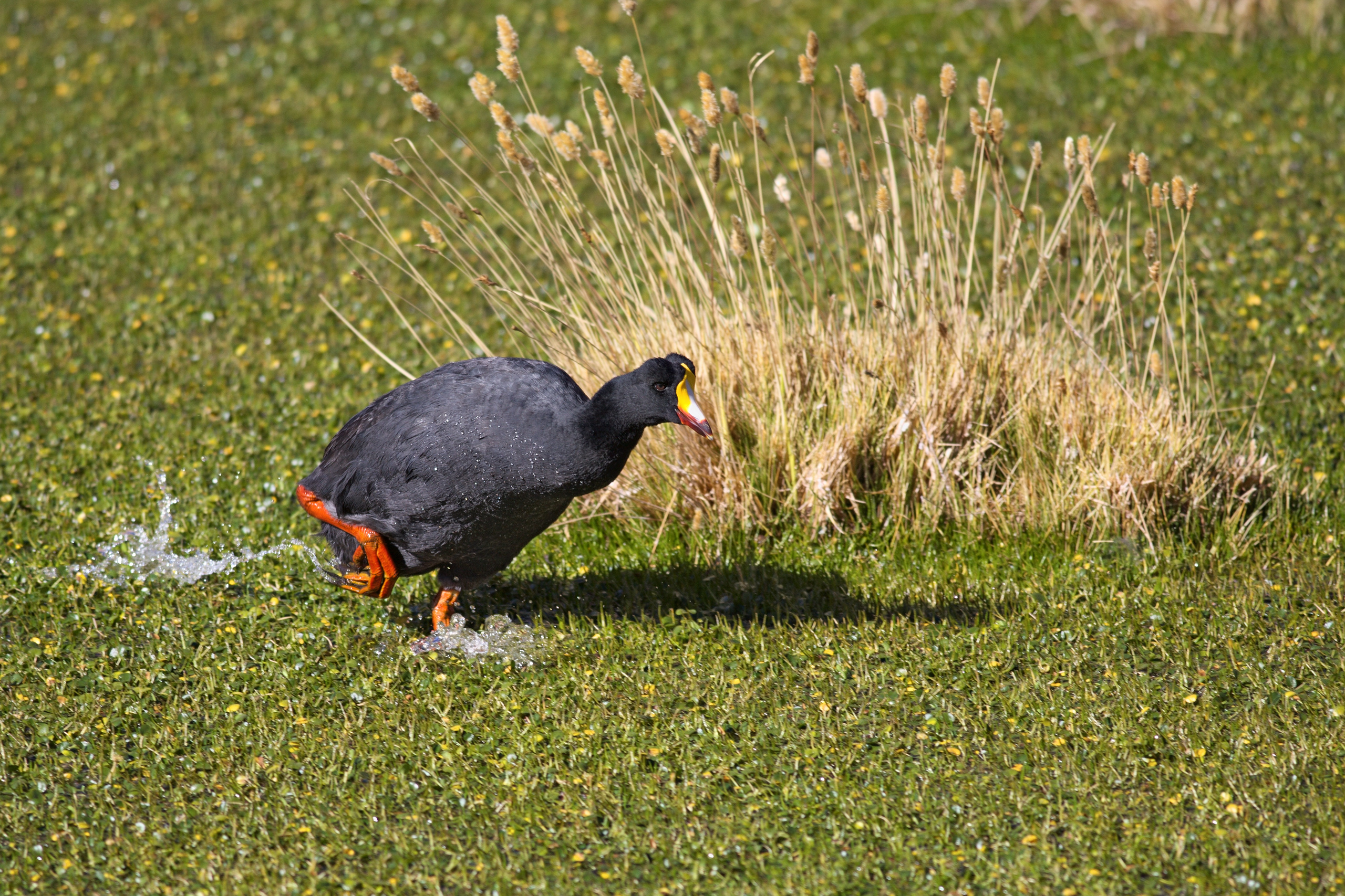 Ein Riesenblässhuhn platscht über einen Sumpf in den chilenischen Anden.